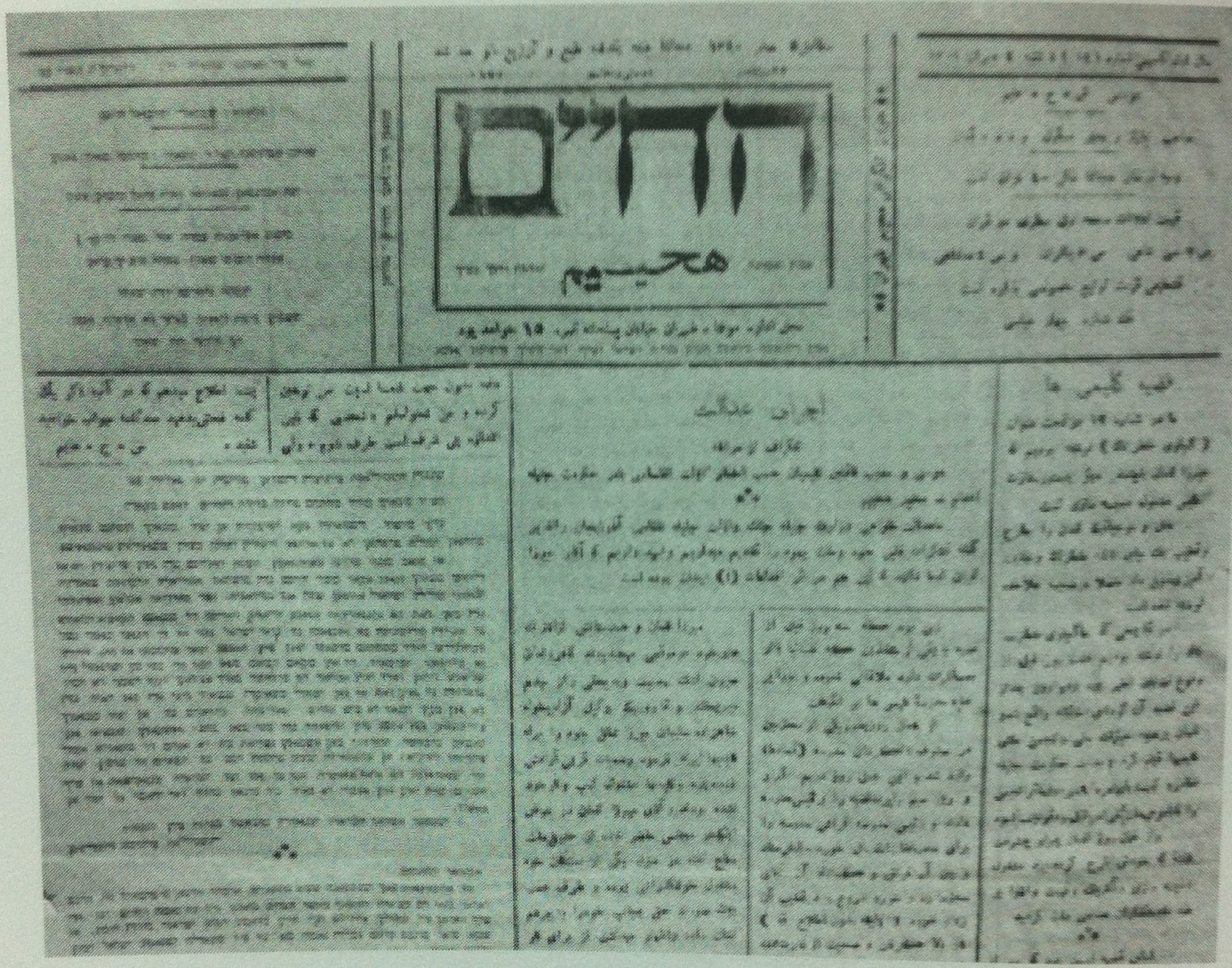 Ha-Haim (1922-1925), a Judeo-Persian newspaper published by Samuel Haim. The right section is in standard Persian and the left is in Judeo-Persian (in hebrew letters)גיליון מתאריך: ד' באב תרפ"ה